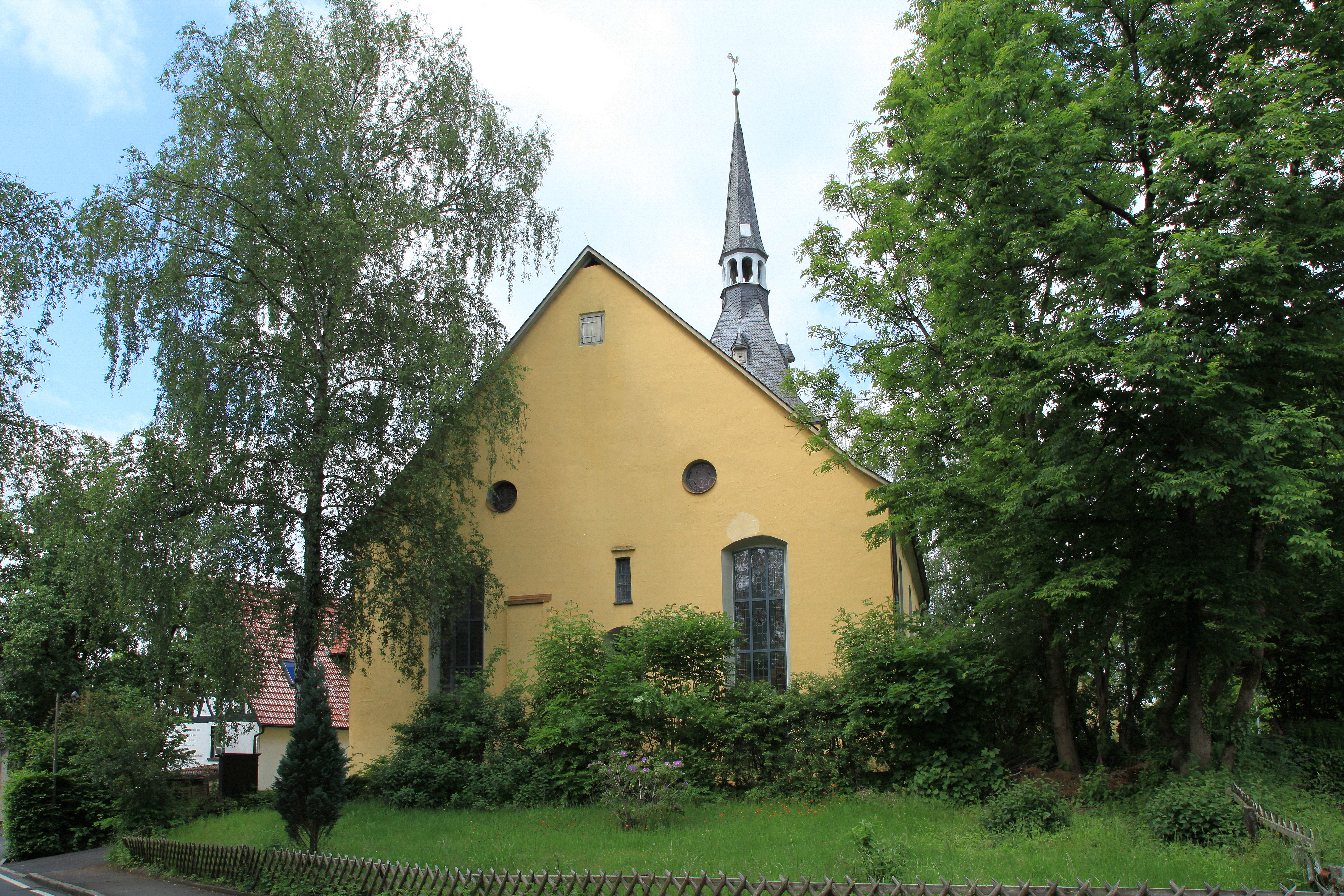 Servatiuskirche, Kirchstraße / Vor dem Isern in Rönsahl, Kierspe